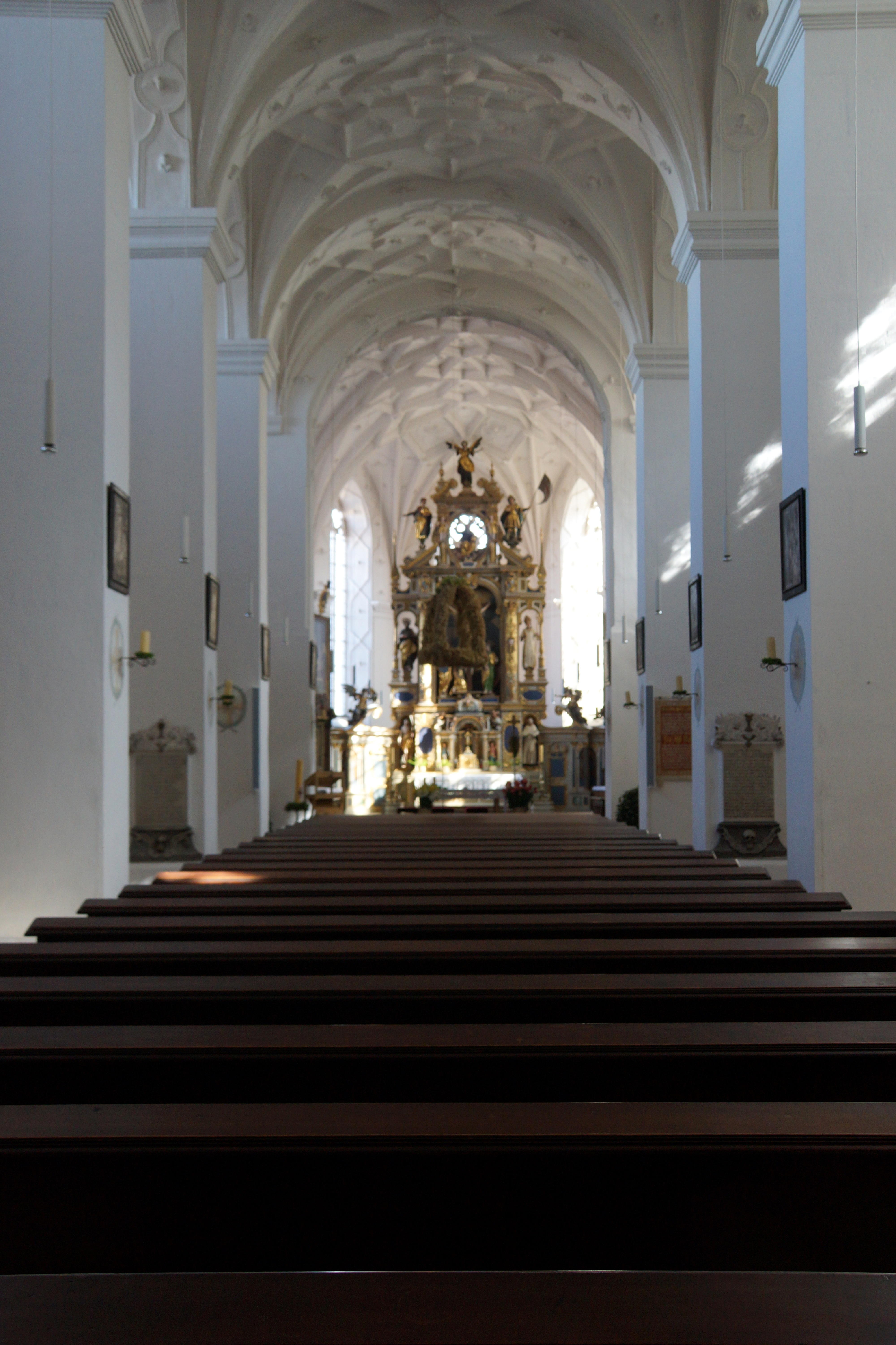 Die Klosterkirche St. Vitus des Karthäuserklosters Prüll in Regensburg